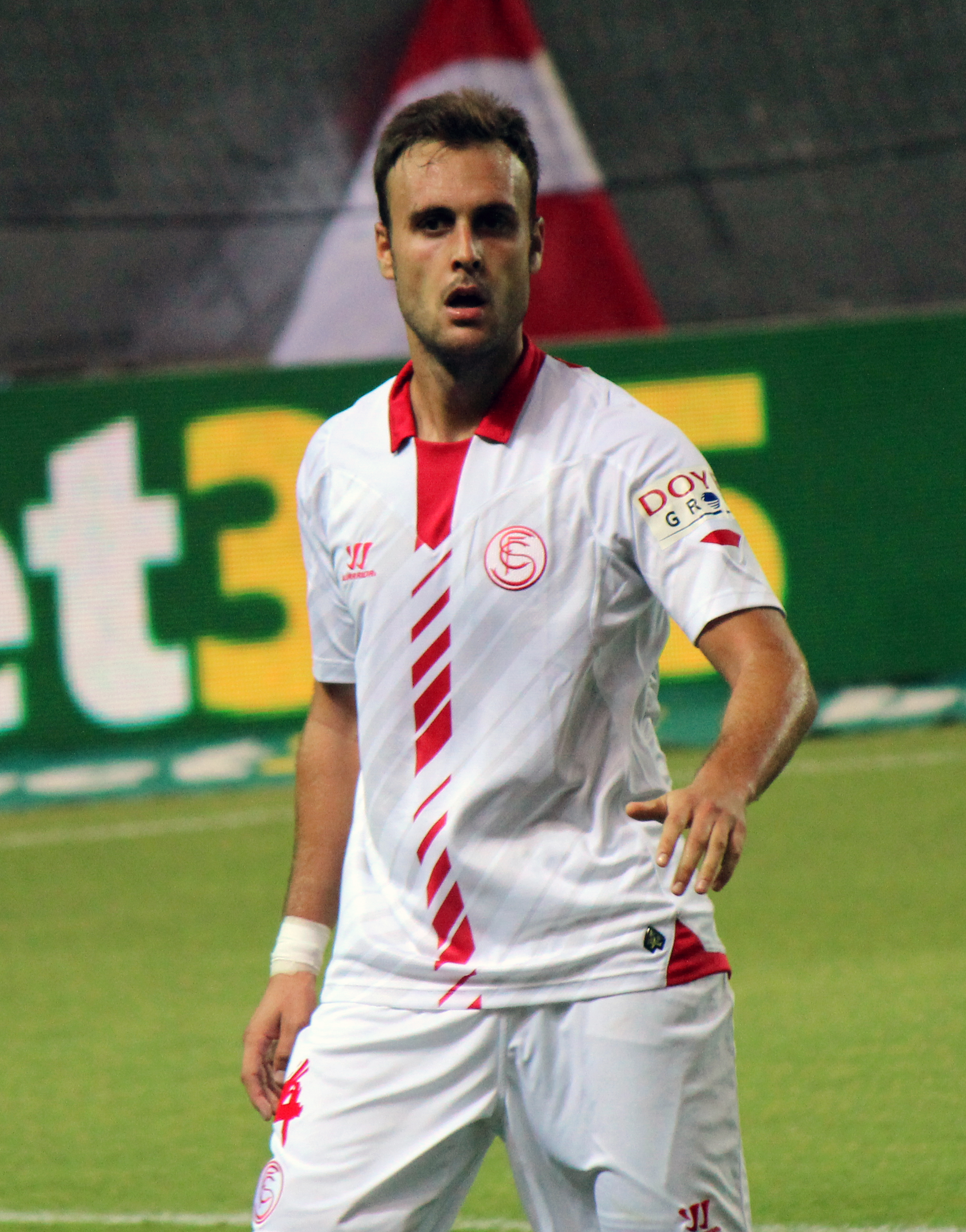 Juan Cala en un partido con el Sevilla FC